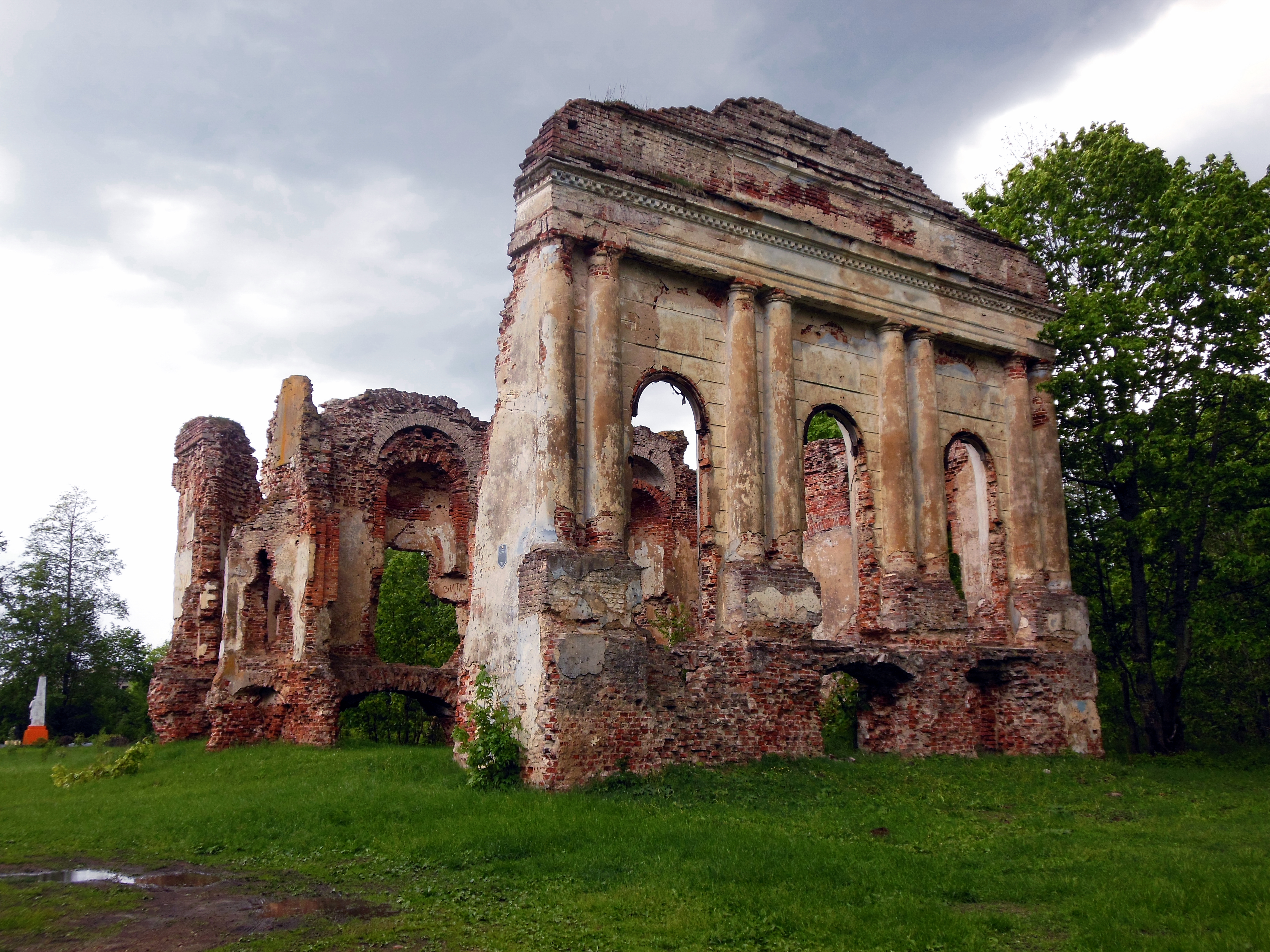 Беларуская (тарашкевіца): Належаў Гільзэнам і Шадурскім